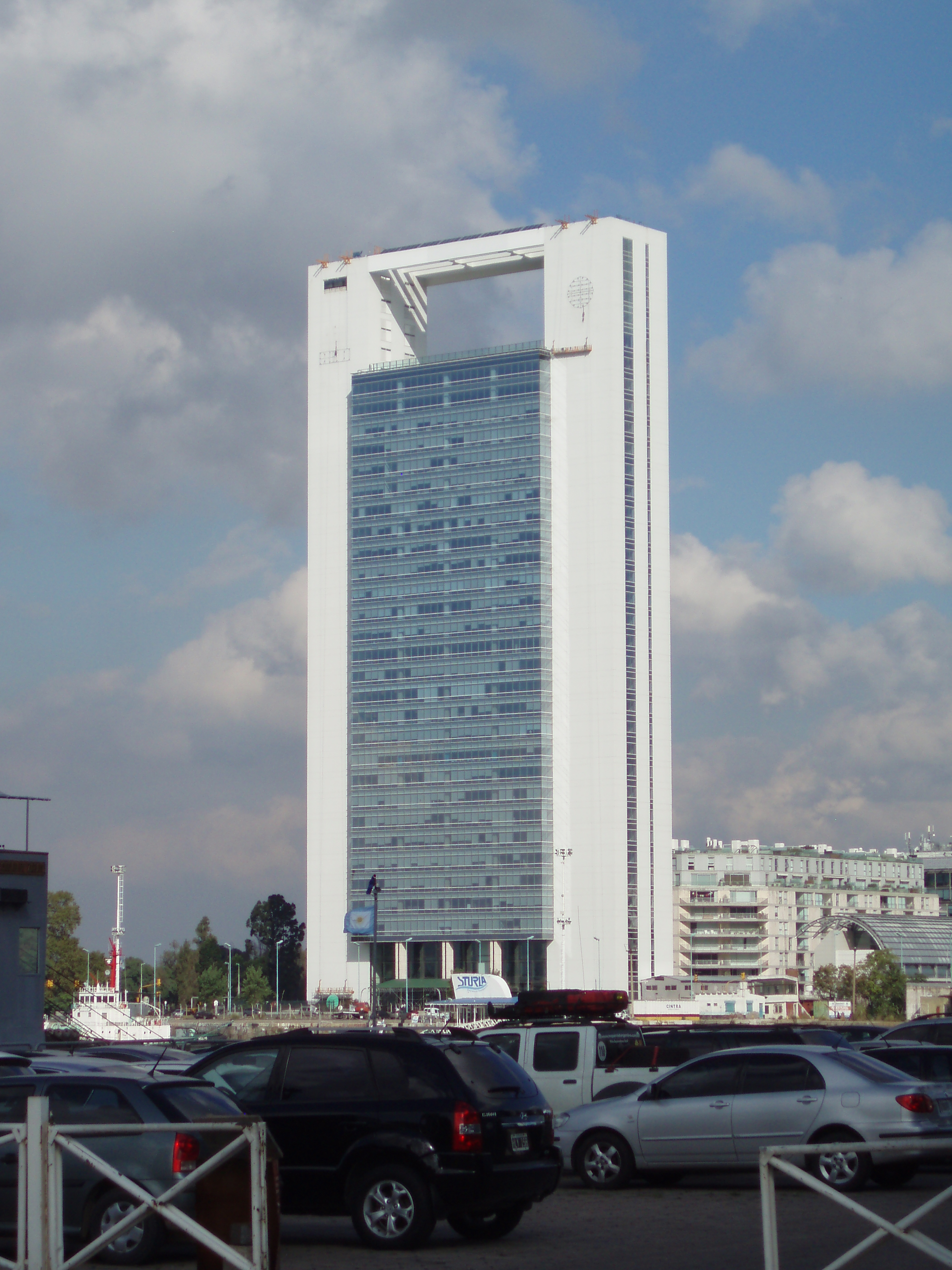 Torre Madero Office, Buenos Aires.